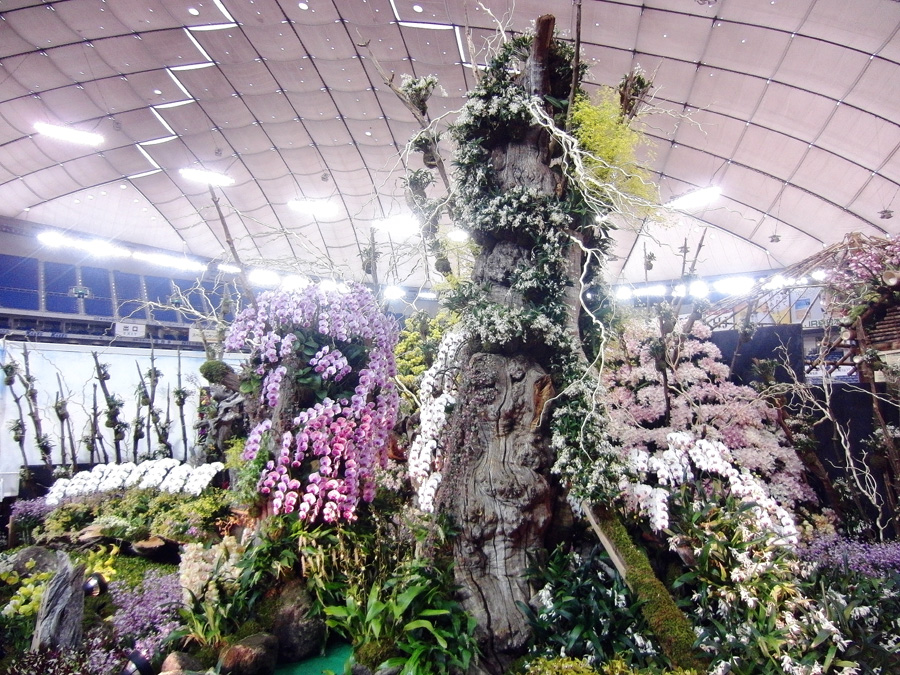 JGP2012【部門3】 最優秀賞 「蘭の森」 Orchid in a primeval forest 2012/02/26東京ドームにて撮影